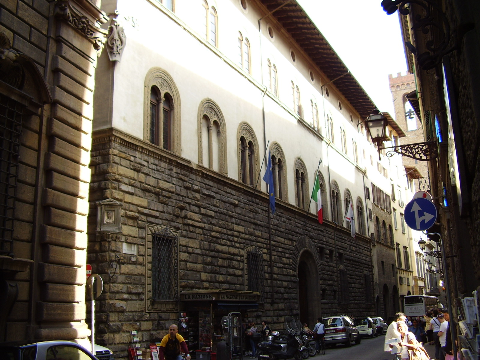 Palazzo de' Pazzi, palace, outside view from Florence, Italy